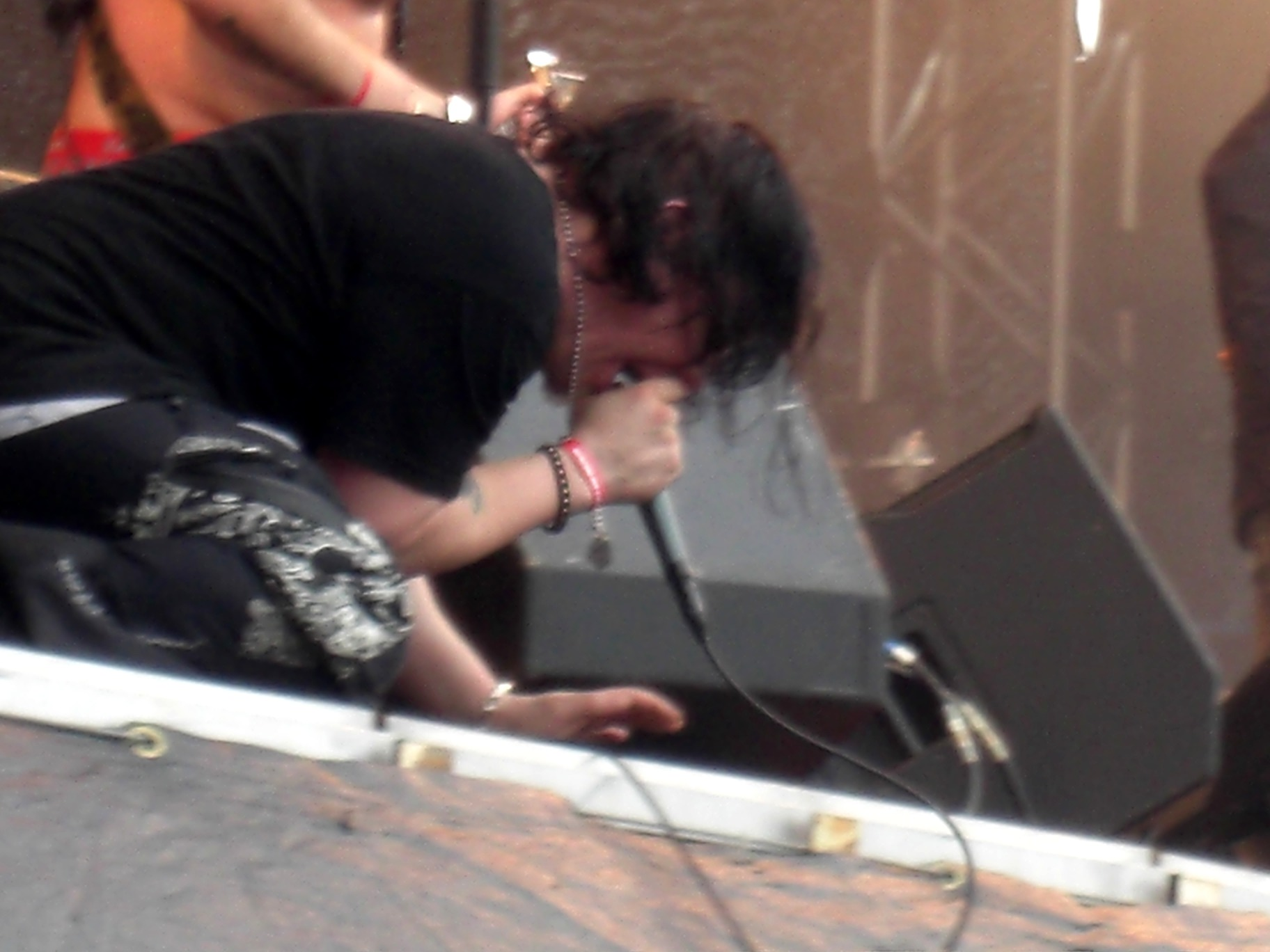 Martin Westerstrand Skans, Lillasyster, at Metaltown 2008